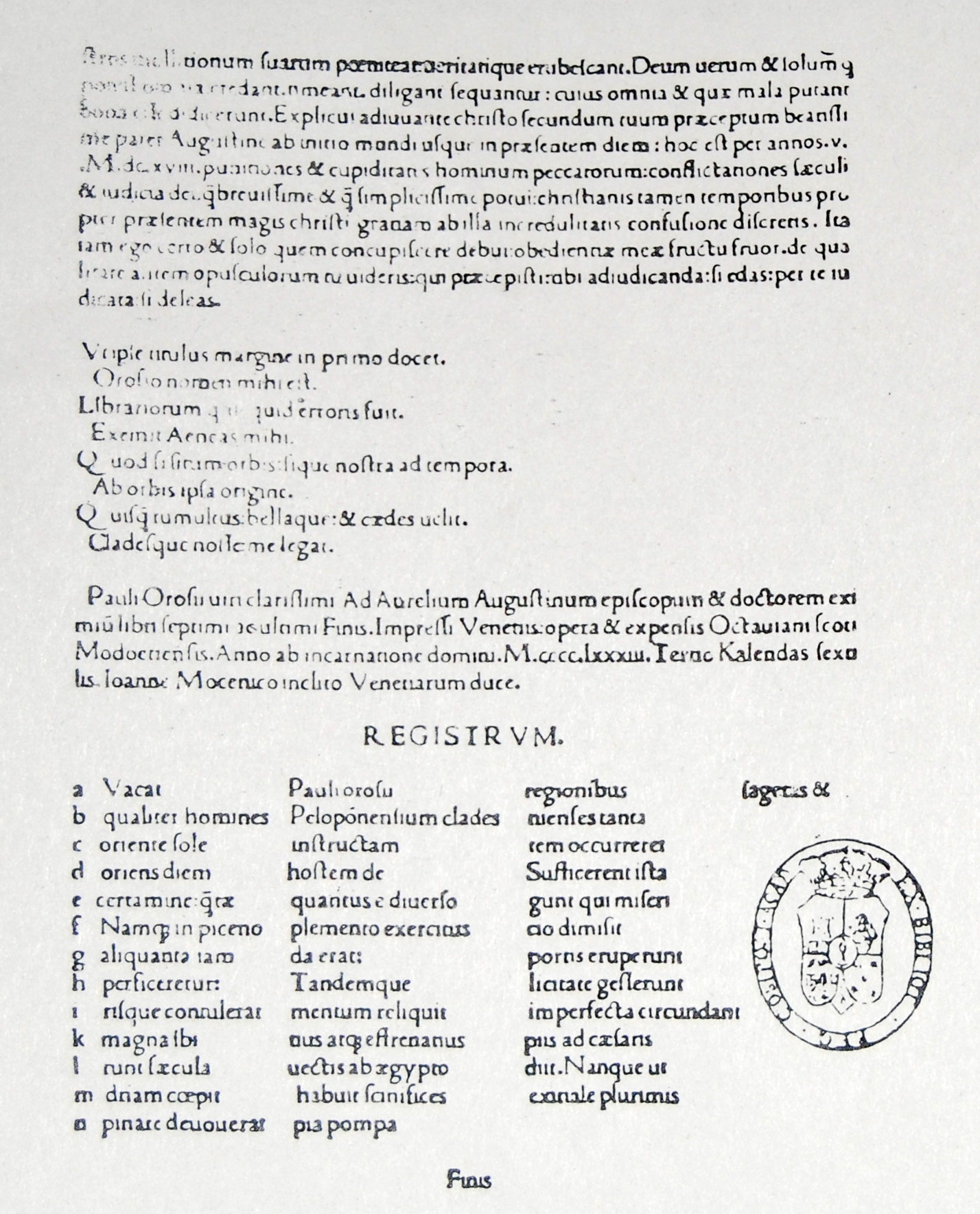 Colofón de un incunable de la Historia Adversus Paganos de Paulo Orosio.